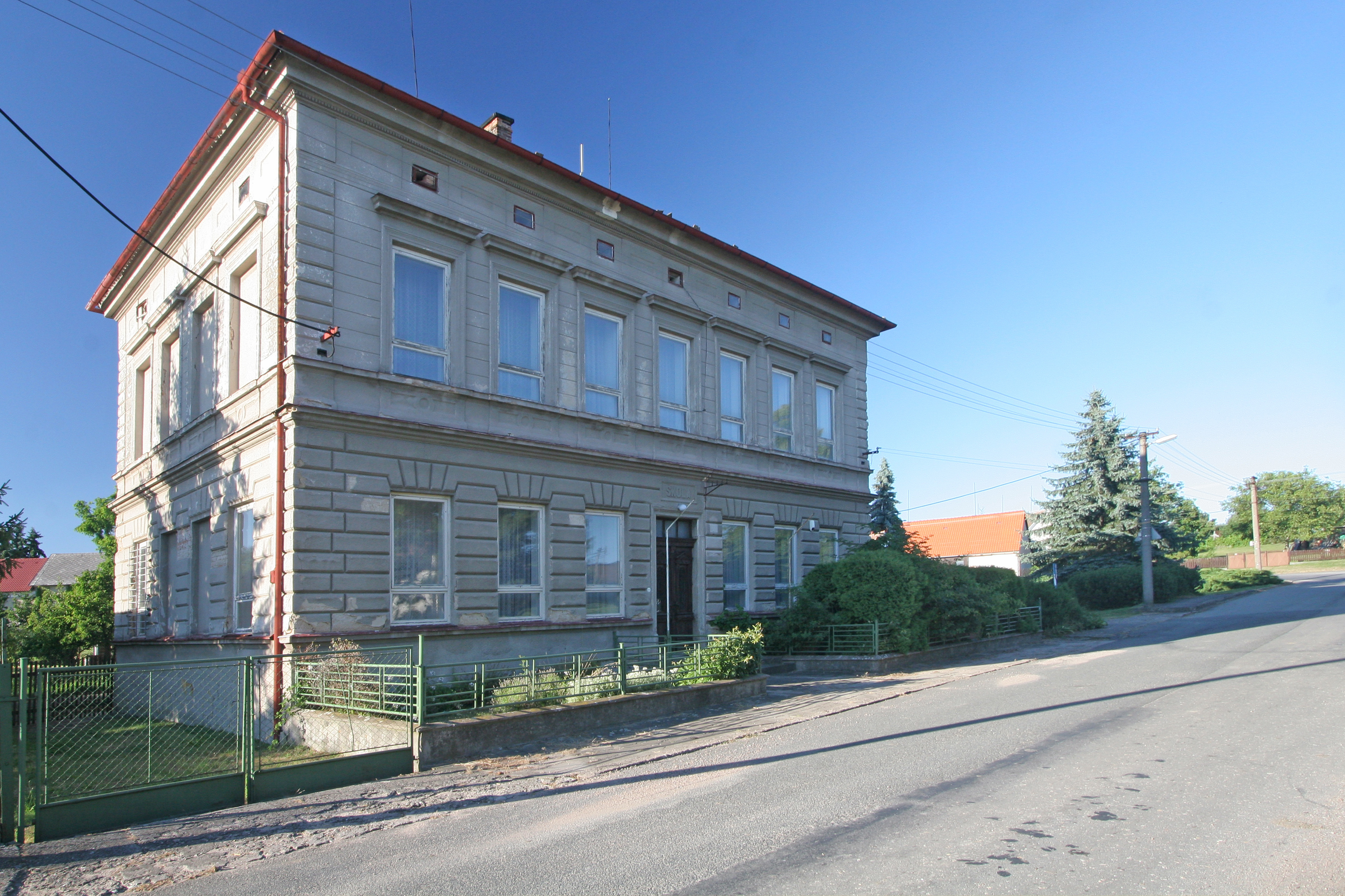 Lišice obecní úřad